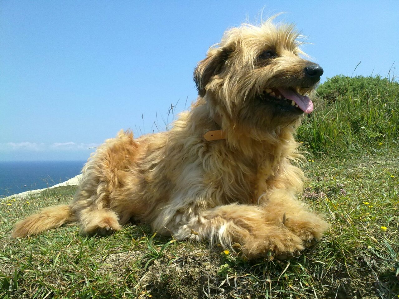 Euskal Artzain Txakurra Aldaera Iletsua